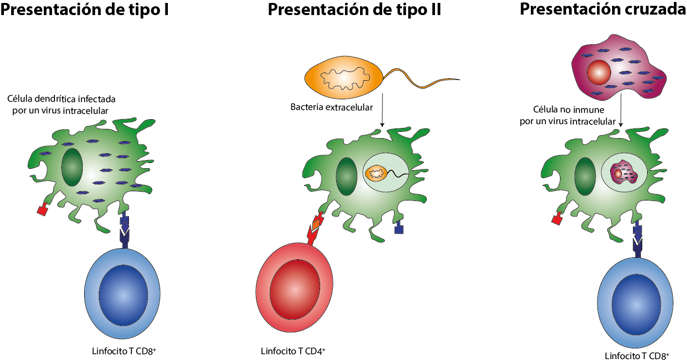 Presentación antigénica a linfocitos T